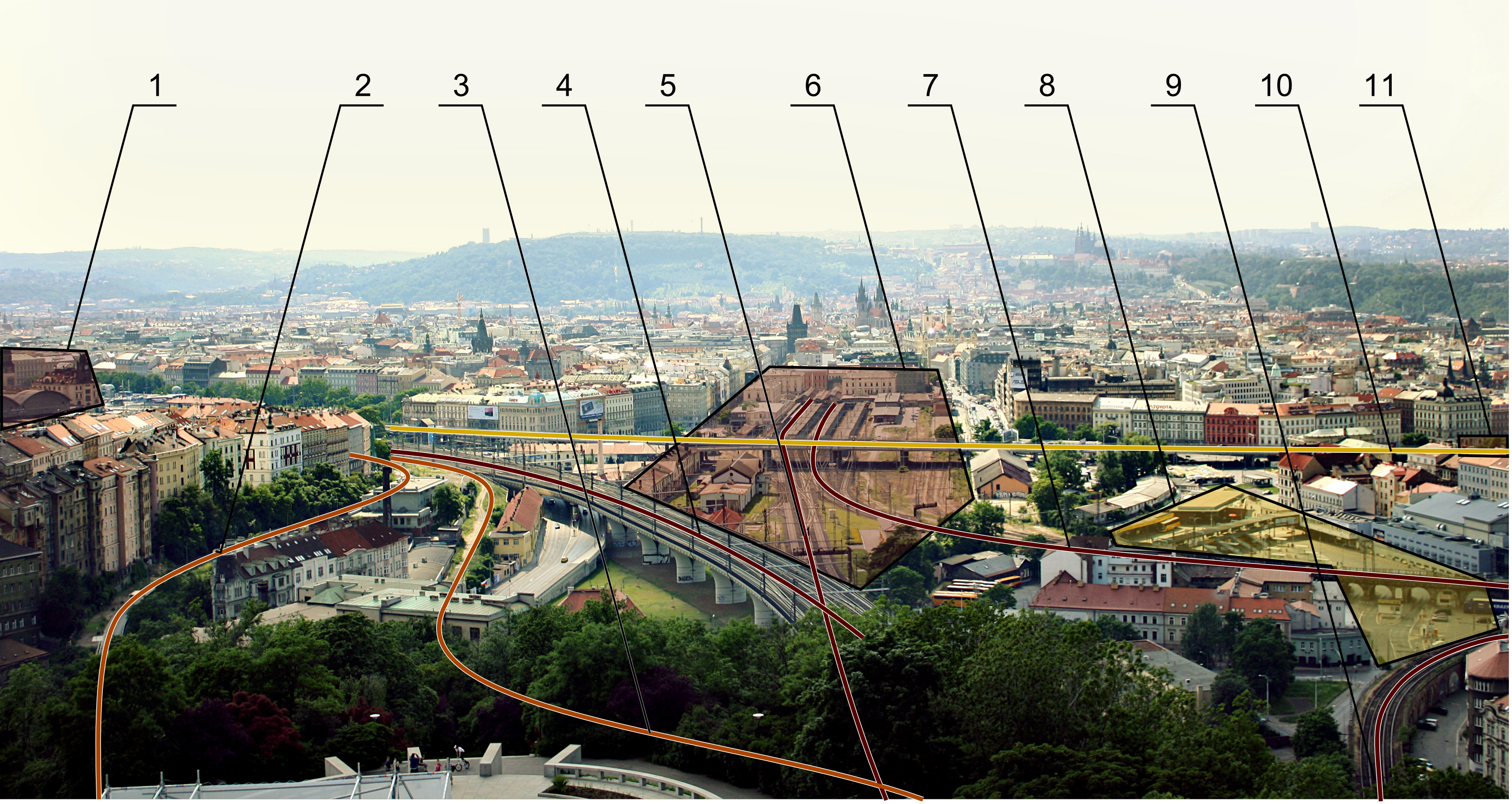 Fotografia srdca pražského železničného uzlu s vyznačenými dôležitými prvkami dopravnej infraštruktúry.